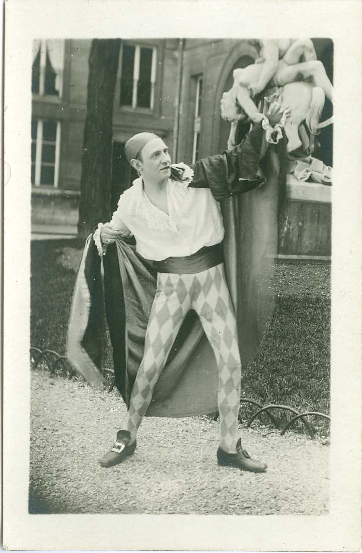 poete Léon Uhl habilé en Arlequin